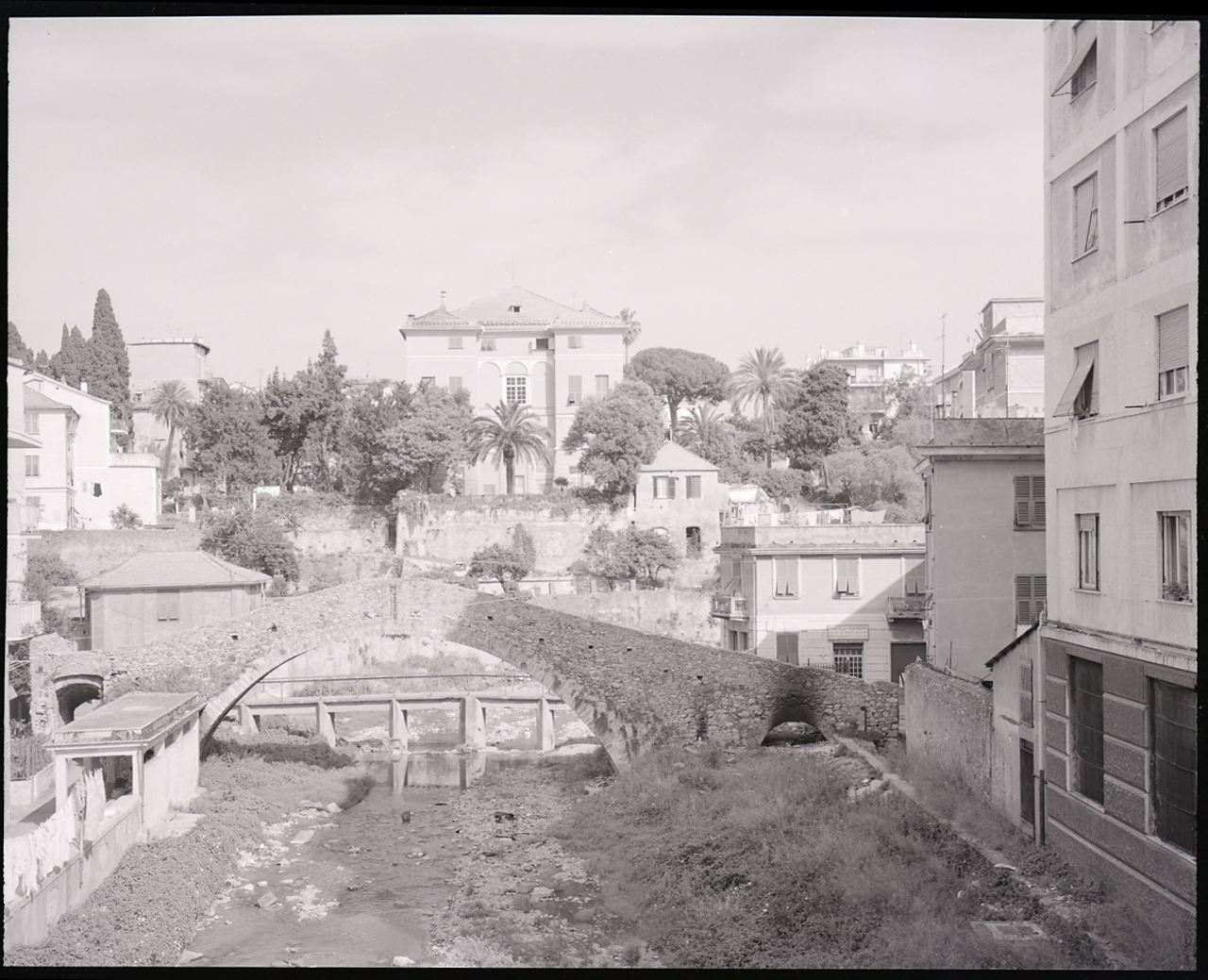 Servizio fotografico : Genova, 1963 / Paolo Monti. - Buste: 2, Fototipi: 2 : Negativo b/n, gelatina bromuro d'argento/ pellicola ; 10x12. - ((Serie costituita da 2 buste sciolte di negativi identificati con i nn.: 6539, 6540. - Il negativo identificato con il numero 46397 è stato realizzato per Zodiac. - Occasione: Documentazione per la pubblicazione: Italia Nostra (a cura di), "Le ville genovesi", catalogo della mostra, Genova 1962, Genova, Comune di Genova, 1967. - Fonte: . - Fonte: Monografia di Italia Nostra (a cura di): Le ville genovesi, catalogo della mostra, Genova 1962, Genova, Comune di Genova (1967). - Fonte: Lettera di Paolo Monti: I. Carteggi/ Genova - Enrico (1963-1966), presso Archivio Paolo Monti. Camicia con documenti dattiloscritti e manoscritti vari relativi al lavoro eseguito per Italia Nostra: preventivi, lettere, inventariRubrica di Paolo Monti: Archivio fino 1-4-1961/ 31-3-1963 (1961-1963), presso Archivio Paolo Monti. - Fonte: Agenda di Paolo Monti: R 1 - Monti/ 1 aprile 1963 - 6 giugno 1964/ 6000-8193 (1963-1964), presso Archivio Paolo Monti